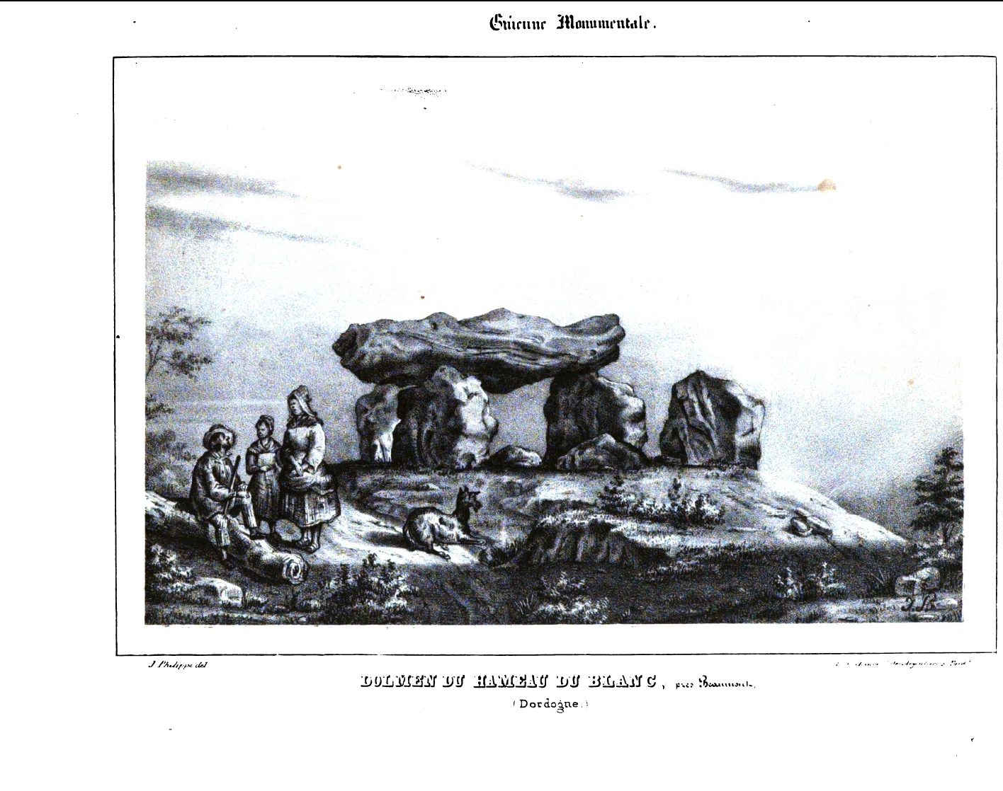 Dolmen de Blanc - Nojals-et-Clotte (Dordogne)